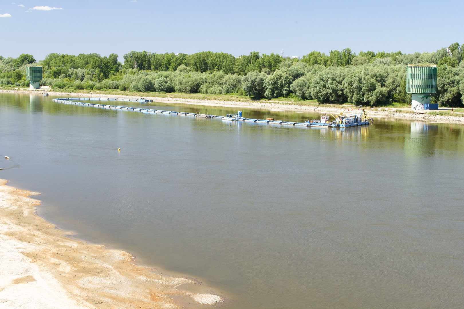 Ujęcia infiltracyjne (studnie) - ujęcie uzupełniające nr 1 (UU1, na lewo) i nr 2 (UU2, na prawo). Pomiędzy nimi pogłębiarka (tzw. piaskarka) „Sawa”. Widok z Mostu Siekierkowskiego. W Wiśle mało wody. This is a photography of Natura 2000 protected area with ID PLB140004